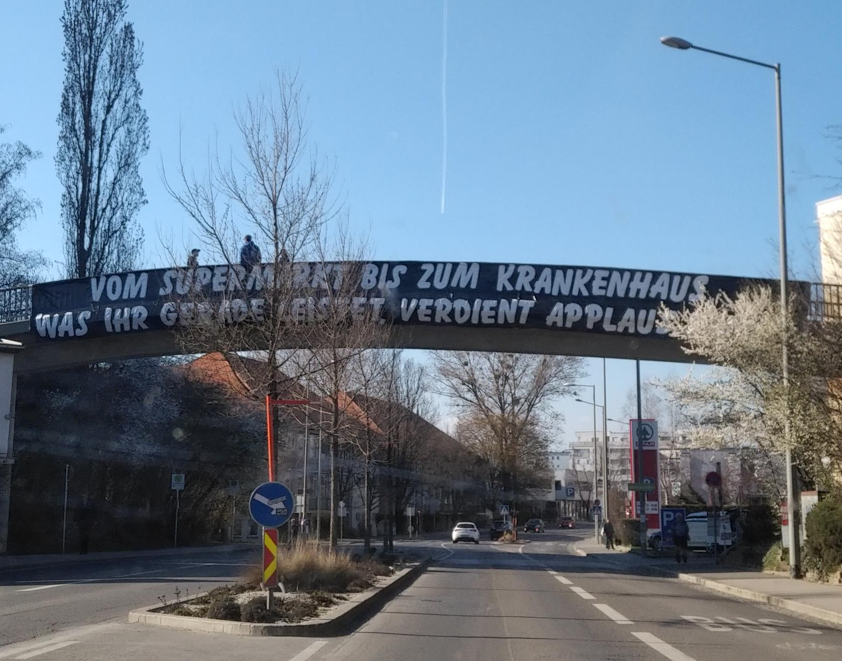 Transparent auf einer Fußgängerbrücke in Graz mit der Aufschrift "Vom Supermarkt bis zum Krankenhaus, was ihr gerade leistet, verdient Applaus!"